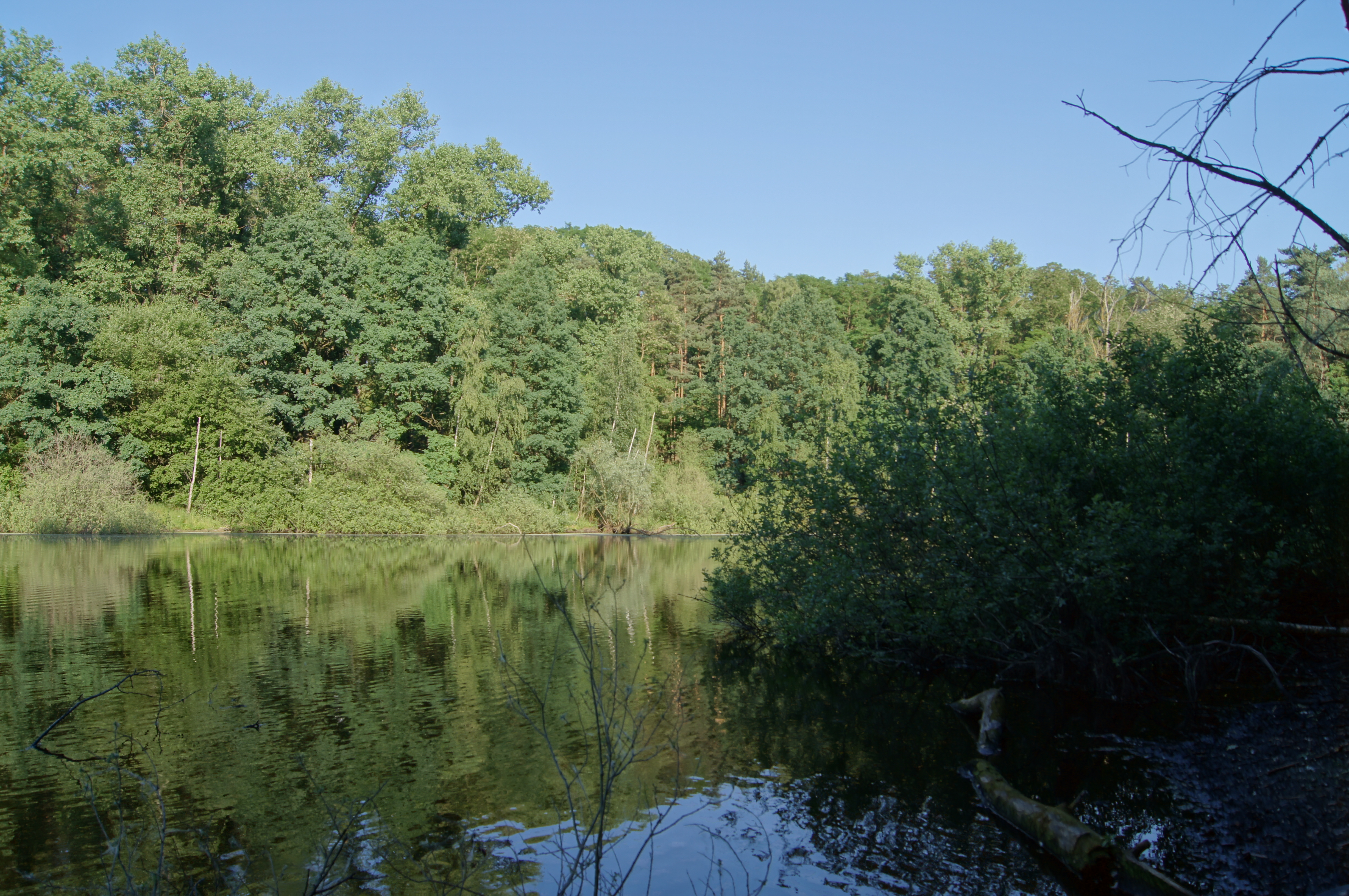 Schafhölle der Biegener Hellen in Hohenwalde (Frankfurt (Oder))